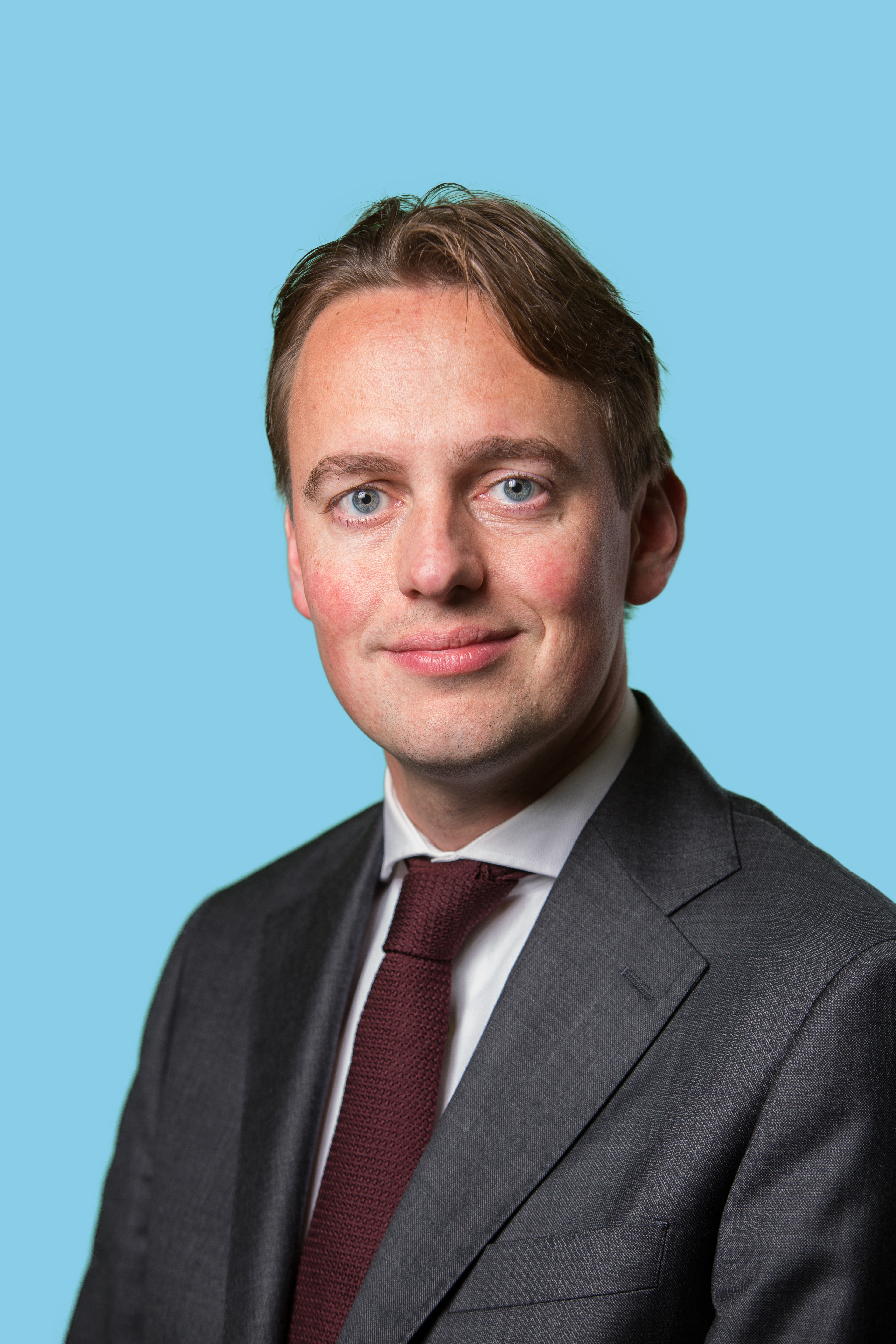 22 november 2016. Tweede Kamerlid voor de Partij van de Arbeid. Foto: Lex Draijer.